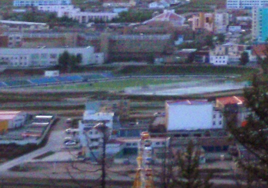 Спорт-центр